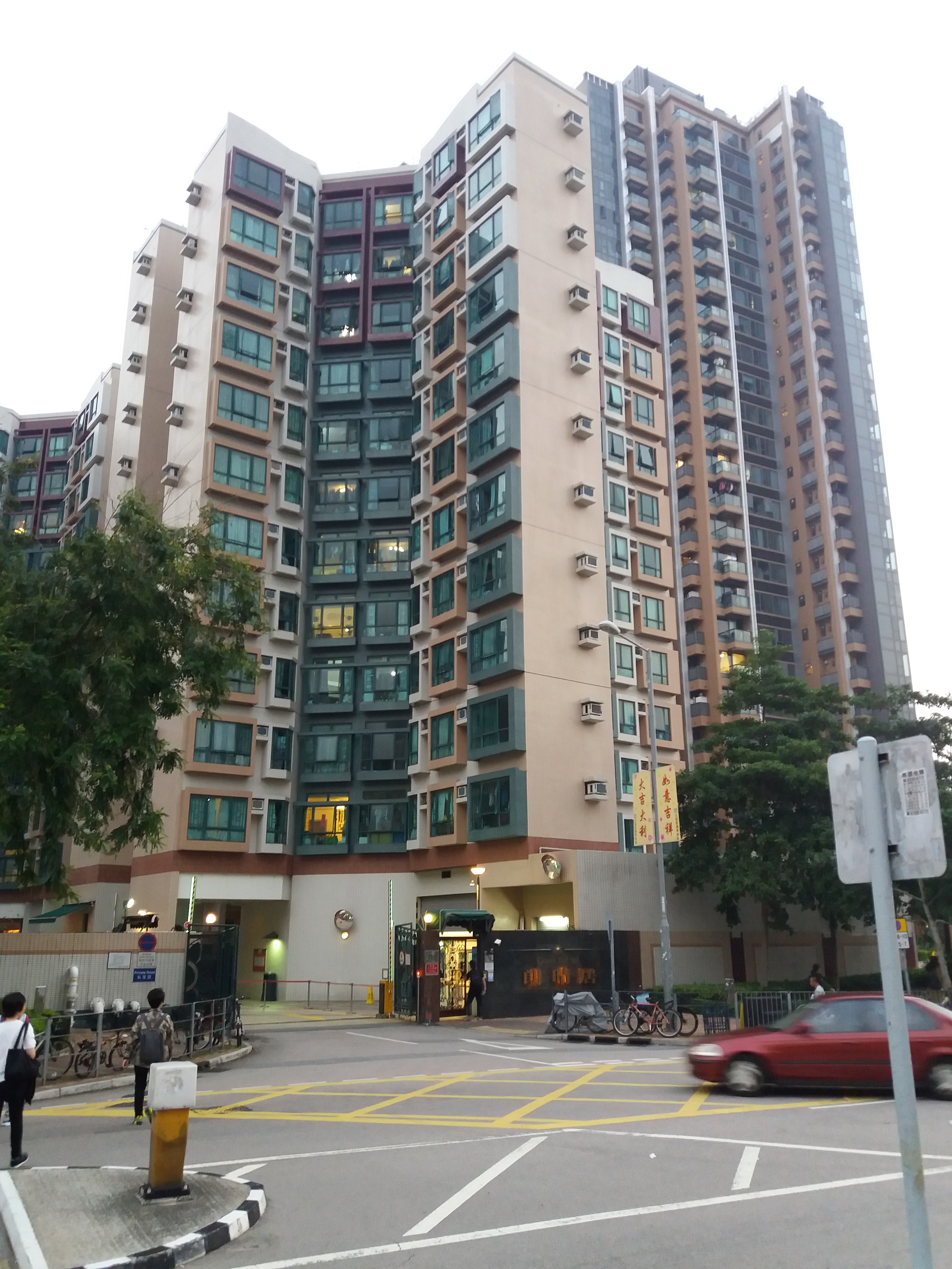 中文（香港）: 朗晴居（2019年）